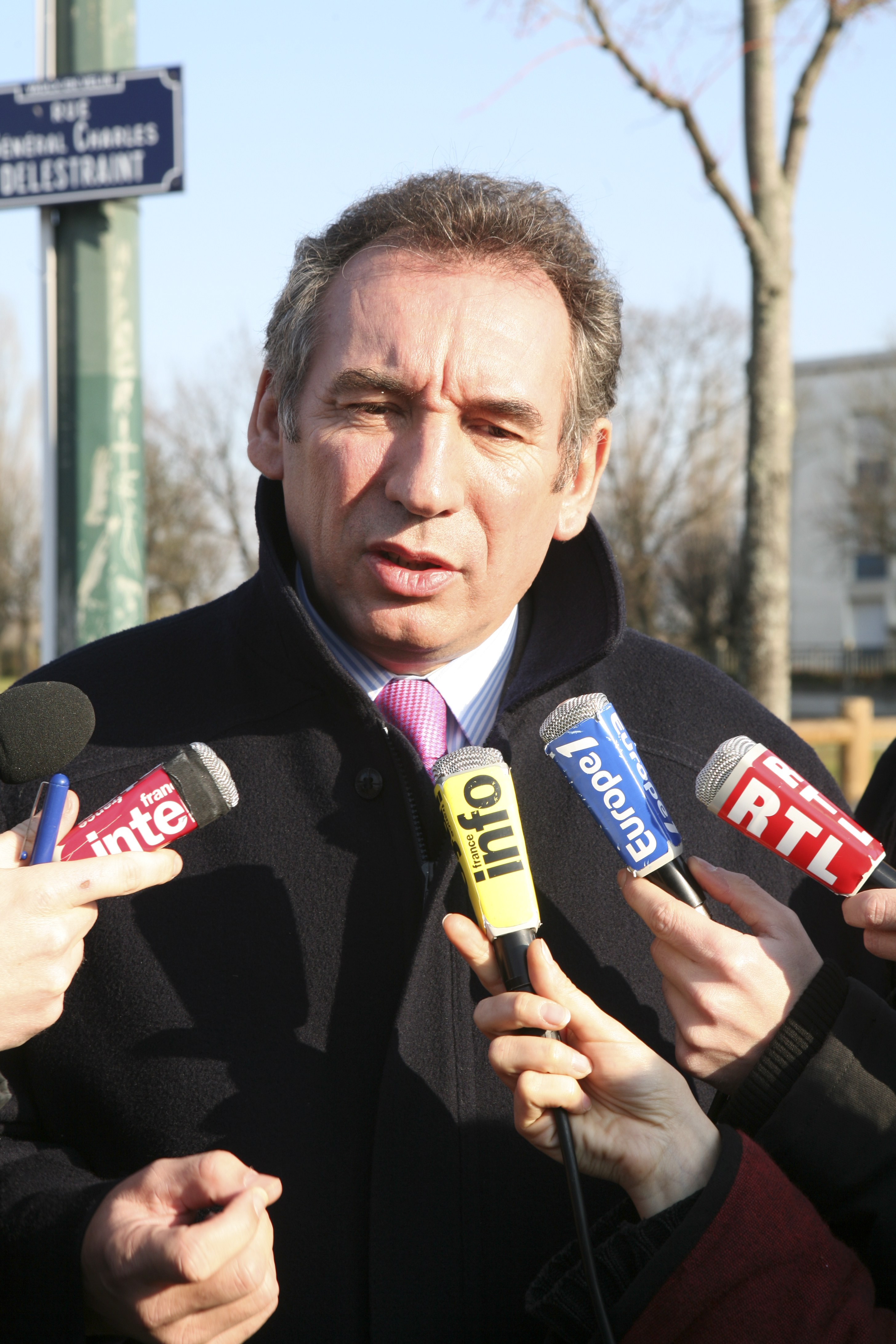 François Bayrou entrevistado por varias emisoras de radio.